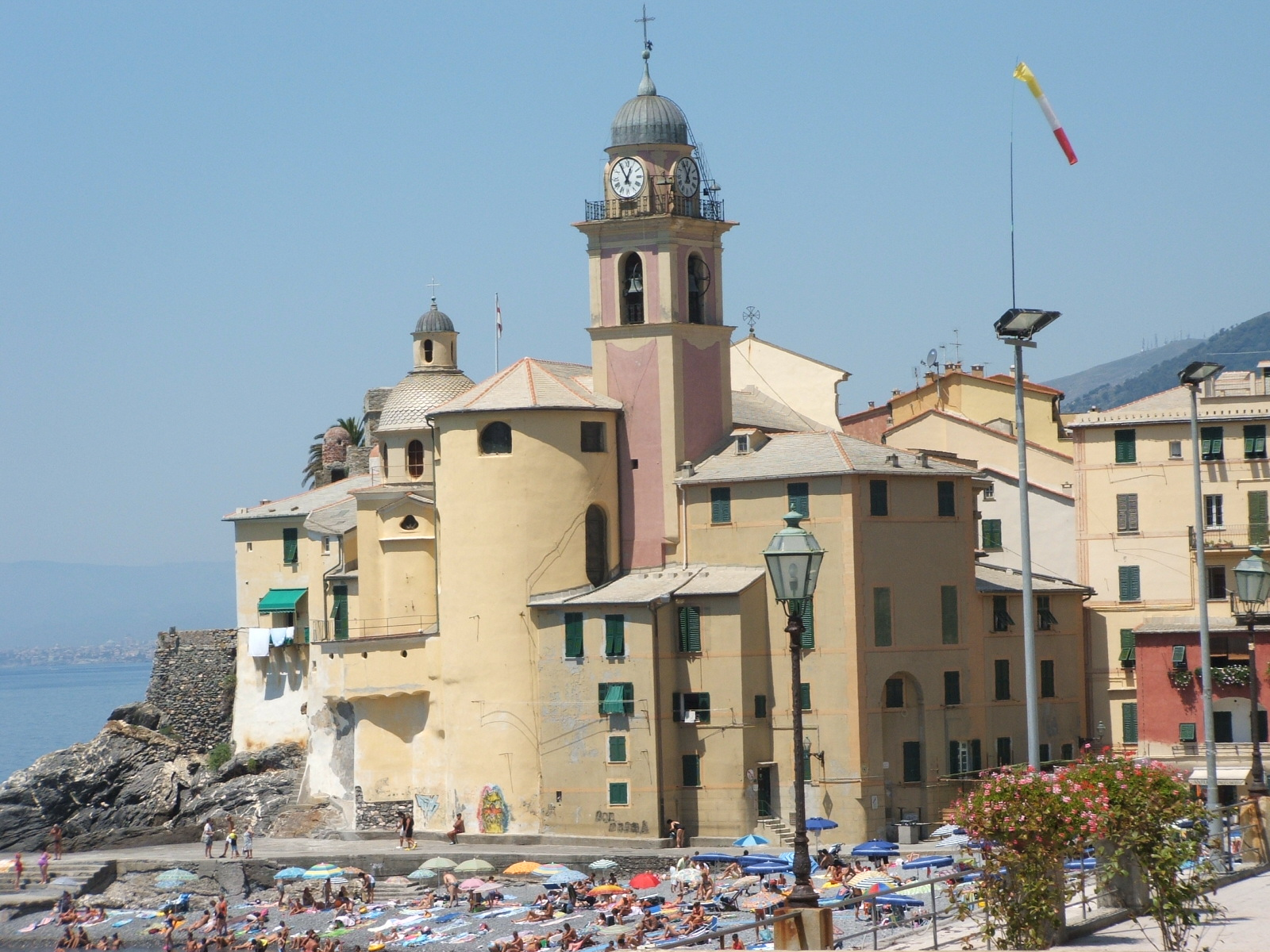 Camogli, provincia di Genova, Liguria, Italia